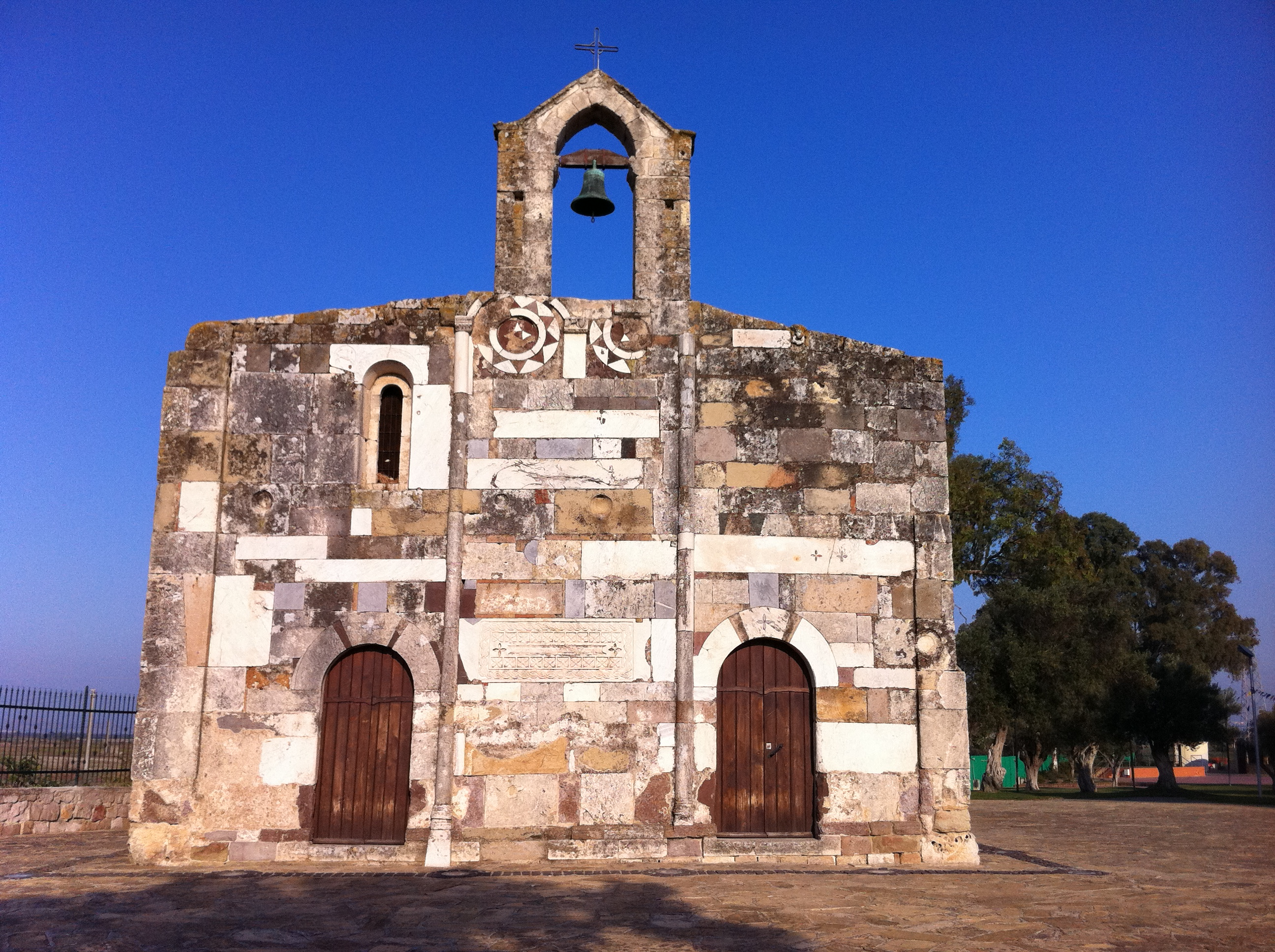 Chiesa romanica (XII sec.) a due navate